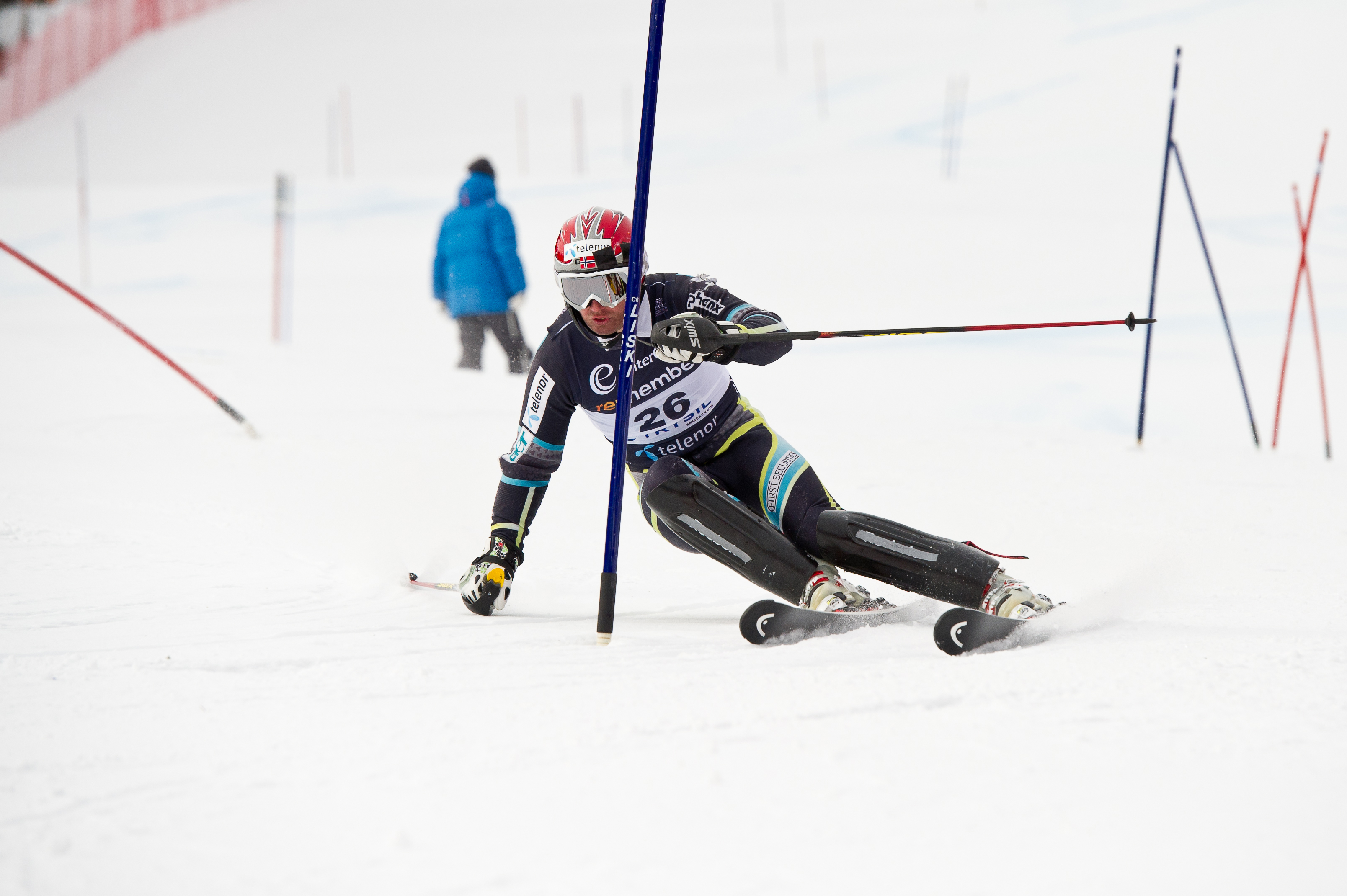 Nr. 6 Truls Ove Karlsen NM i slalåm i Trysil. Foto: Ola Matsson